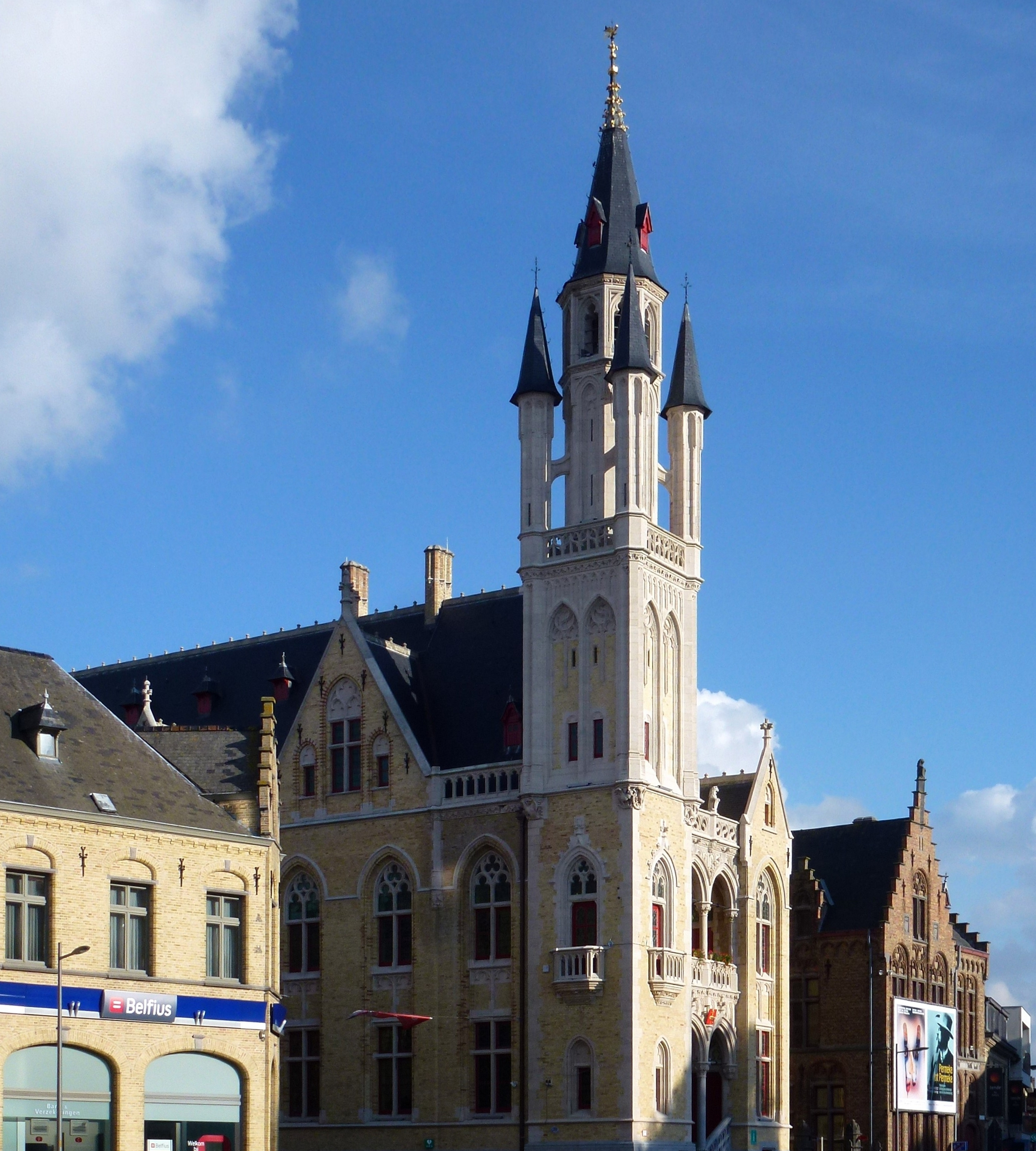 le beffroi et l'hôtel de ville (Stadhuis) Poperinge, Belgique